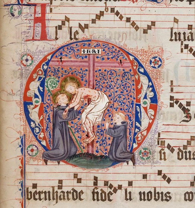 Hl. Bernhard (Amplexus-Motiv) aus einem Graduale cisterciense, Wonnental, ca. 1340-1350